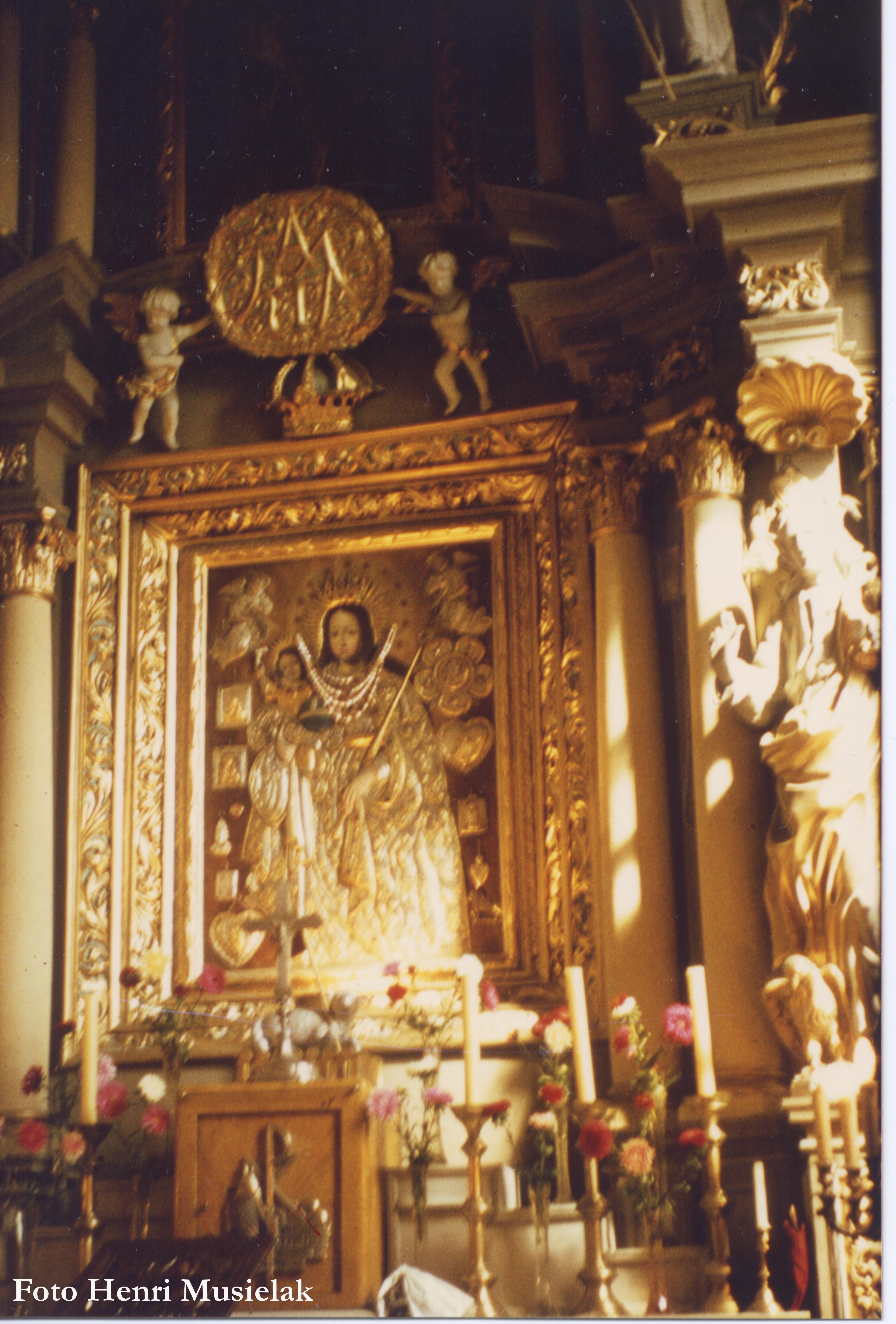 Obraz MB Starogostyńskiej z 1645 r.